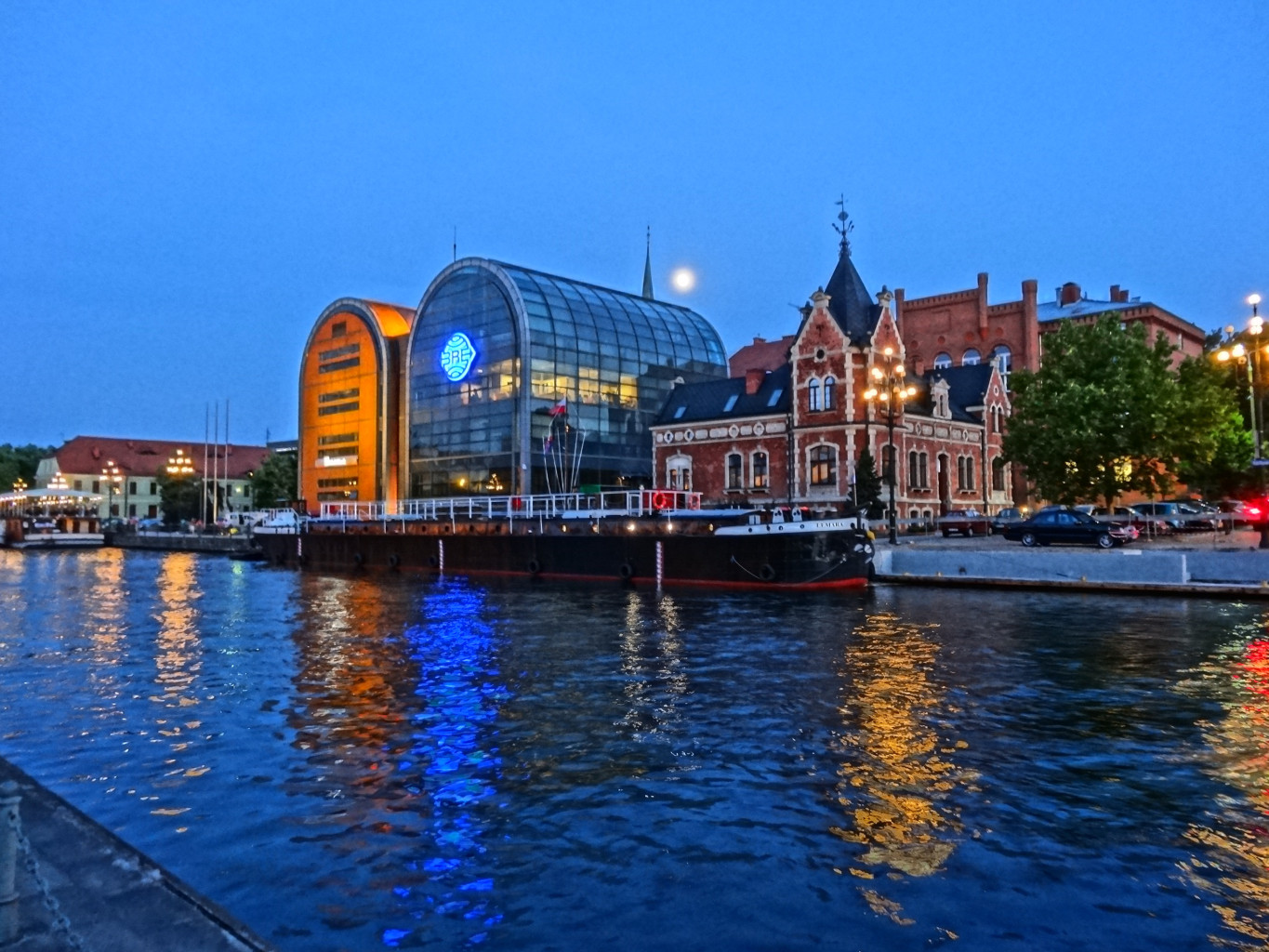 Zespół budynków BRE Banku w Bydgoszczy przy ulicy Grodzkiej, zwanych "szklanymi spichrzami", zbud. w 1998 r.